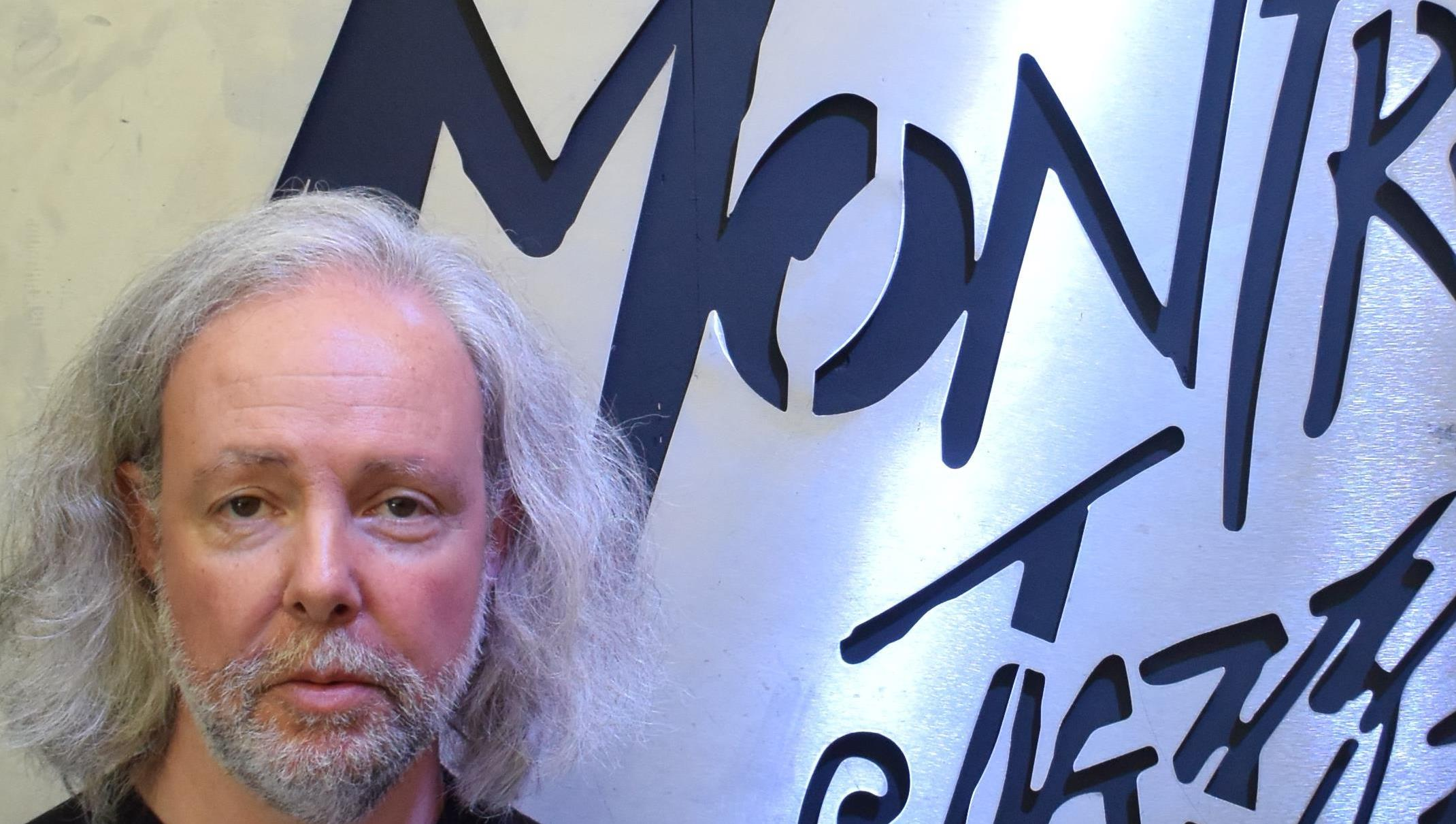 Nicola Bardola